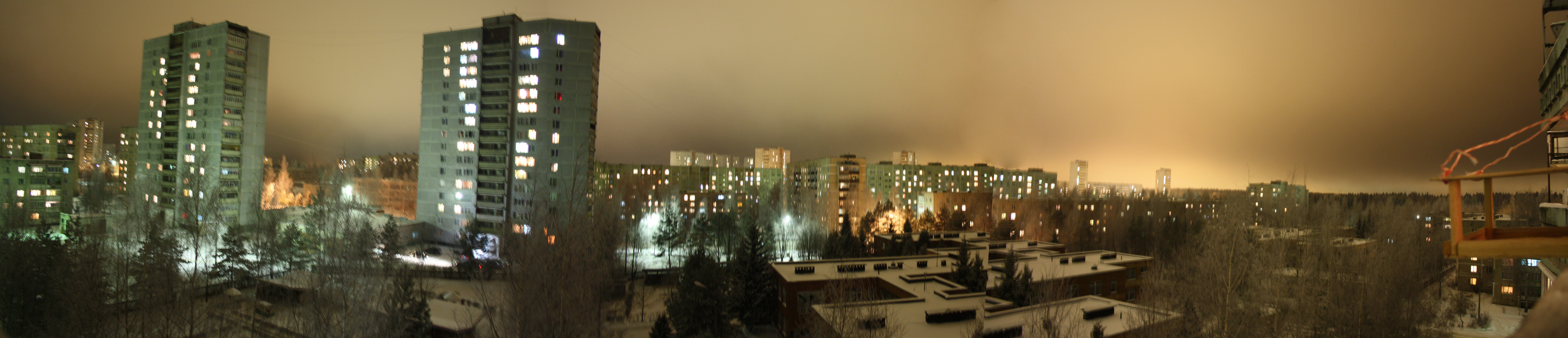 панорама поселка Пионерный, города Ярцево